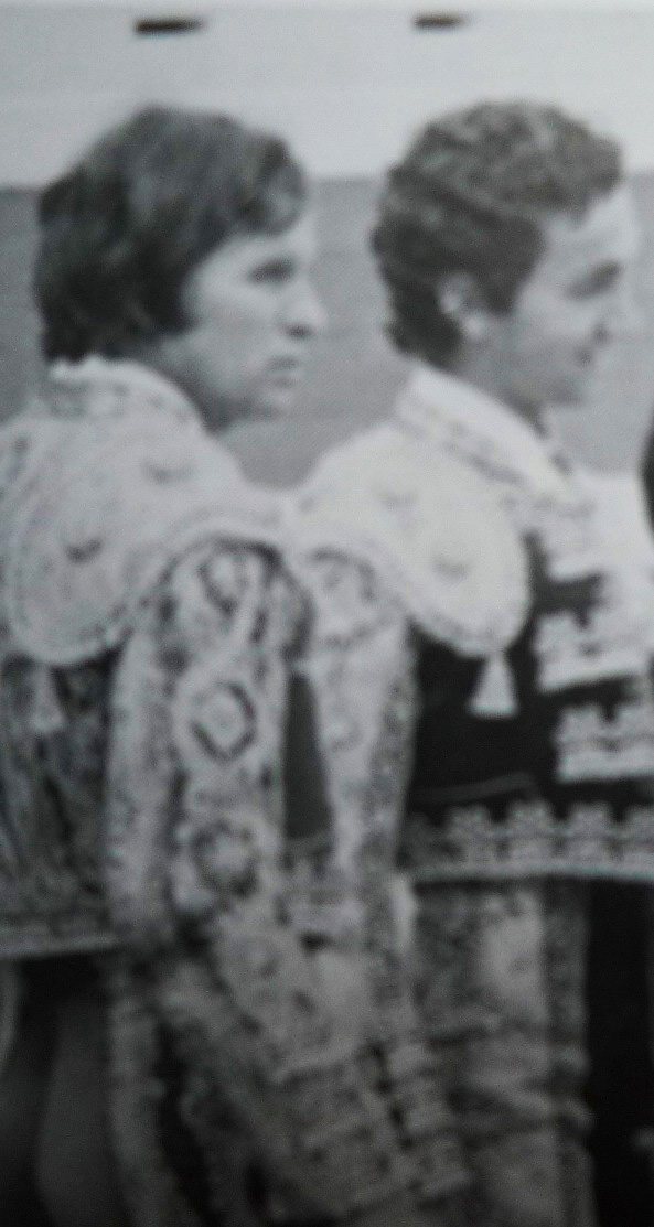 Richard Milian le jour de son alternative à Dax avec El Cordobes son témoin